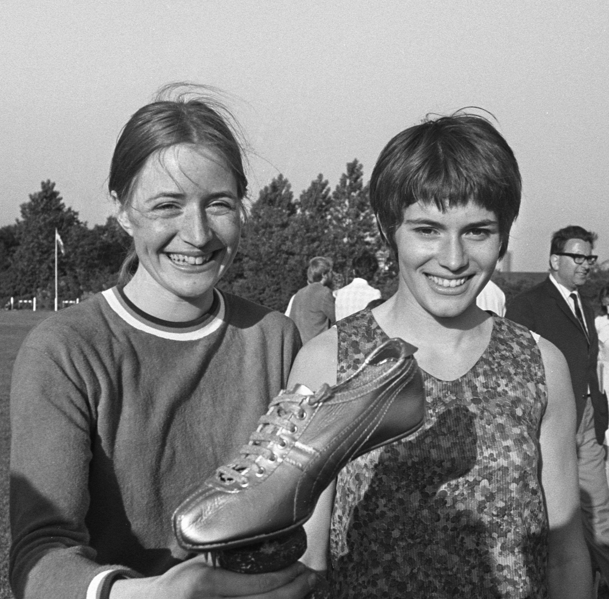 Atletiekkampioenschappen om "Gouden Spike" in Leiden; links Wilma van den Berg met gouden Spike en rechts zusje Riet van den Berg